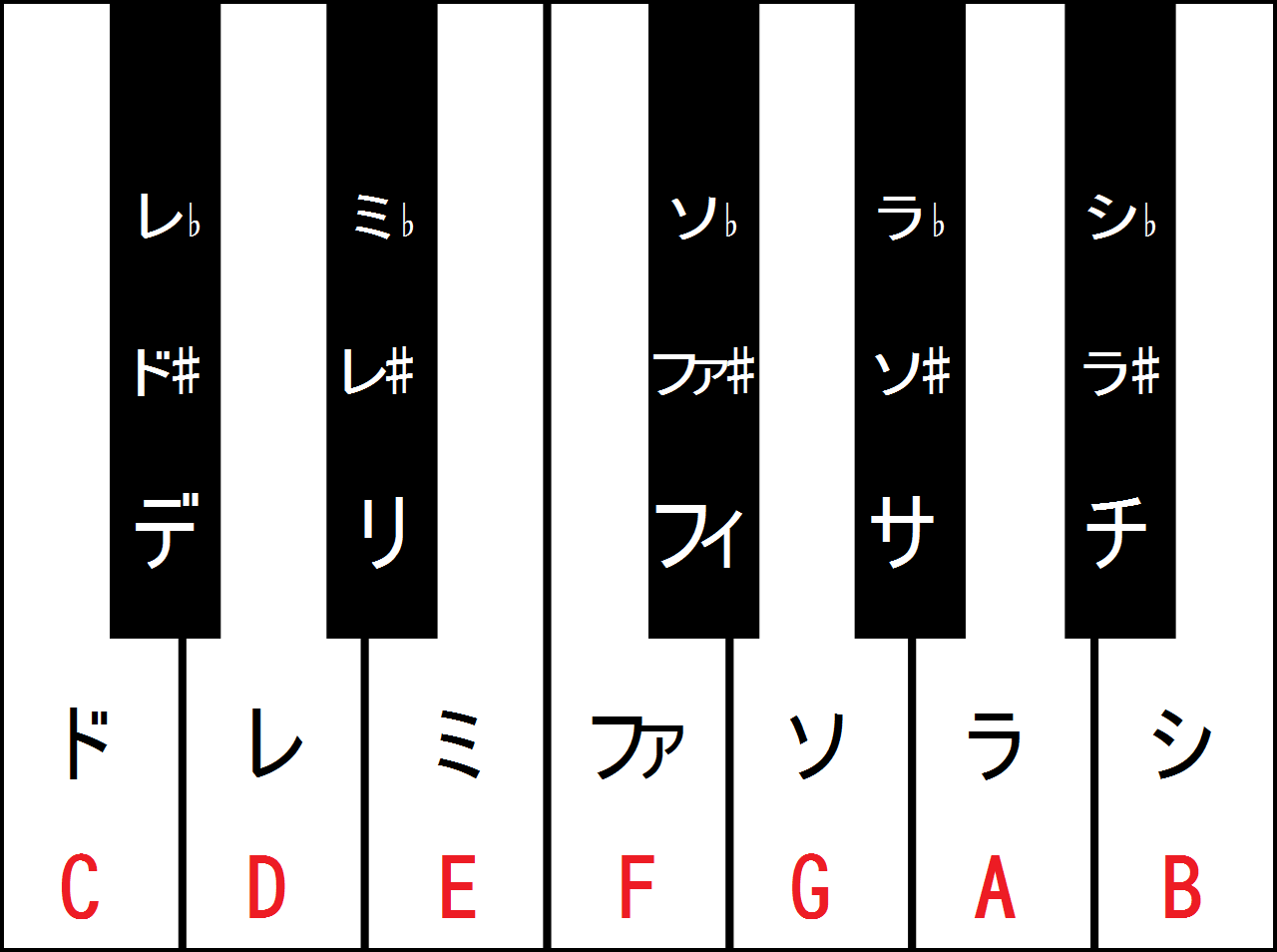 The names of notes by NISHIDUKA(NISHIZUKA) Tomomitsu's method in Japanese letters. Public Domain. 西塚式(西塚智光氏が提唱した方式)の音名・階名表記(ドデレリミファフィソサラチシ)と、「シャープ、フラットつきの固定ド」「英語式の音名表記」の関係をピアノ鍵盤上で表した図。Public Domain(パブリック・ドメイン)扱いにしますので、どなたでも自由にお使いください。